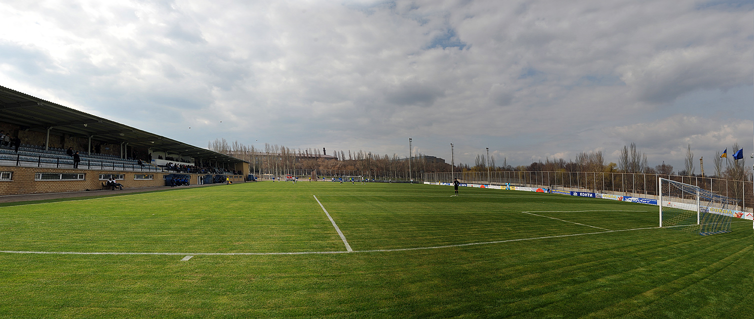 Стадион Олимпик